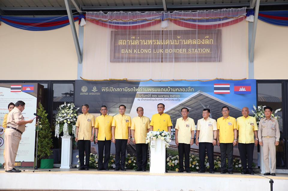 ภาพขณะกล่าวรายงาน โดยนายวรวุฒิ มาลา รองผู้ว่าการกลุ่มธุรกิจการบริหารทรัพย์สิน รักษาการในตำแหน่งผู้ว่าการรถไฟแห่งประเทศไทย